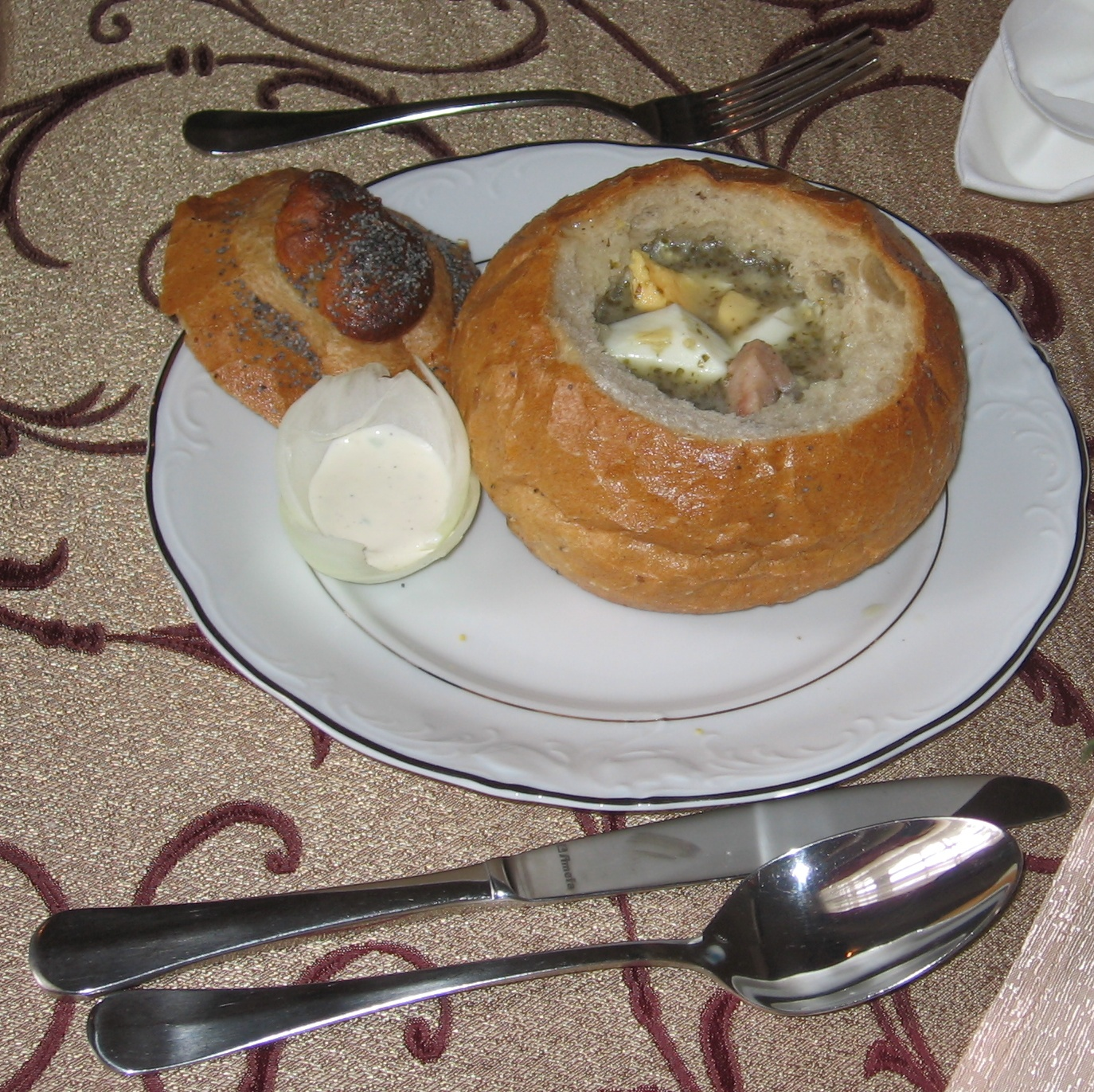 Żurek podany w wydrążonej bułce; obok - w cebulowej miseczce - sos